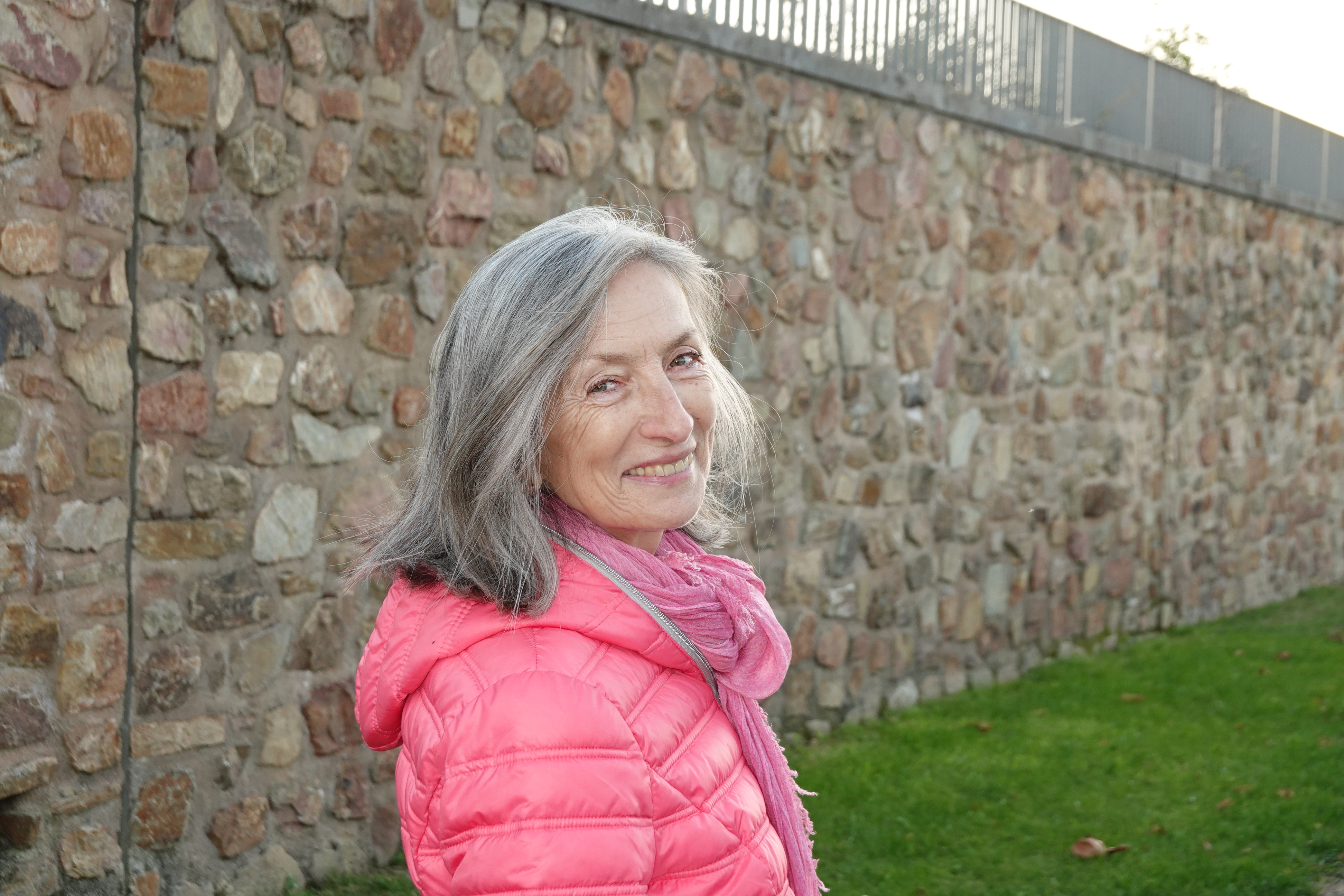 Petra Urban Schriftstellerin, Portrait.